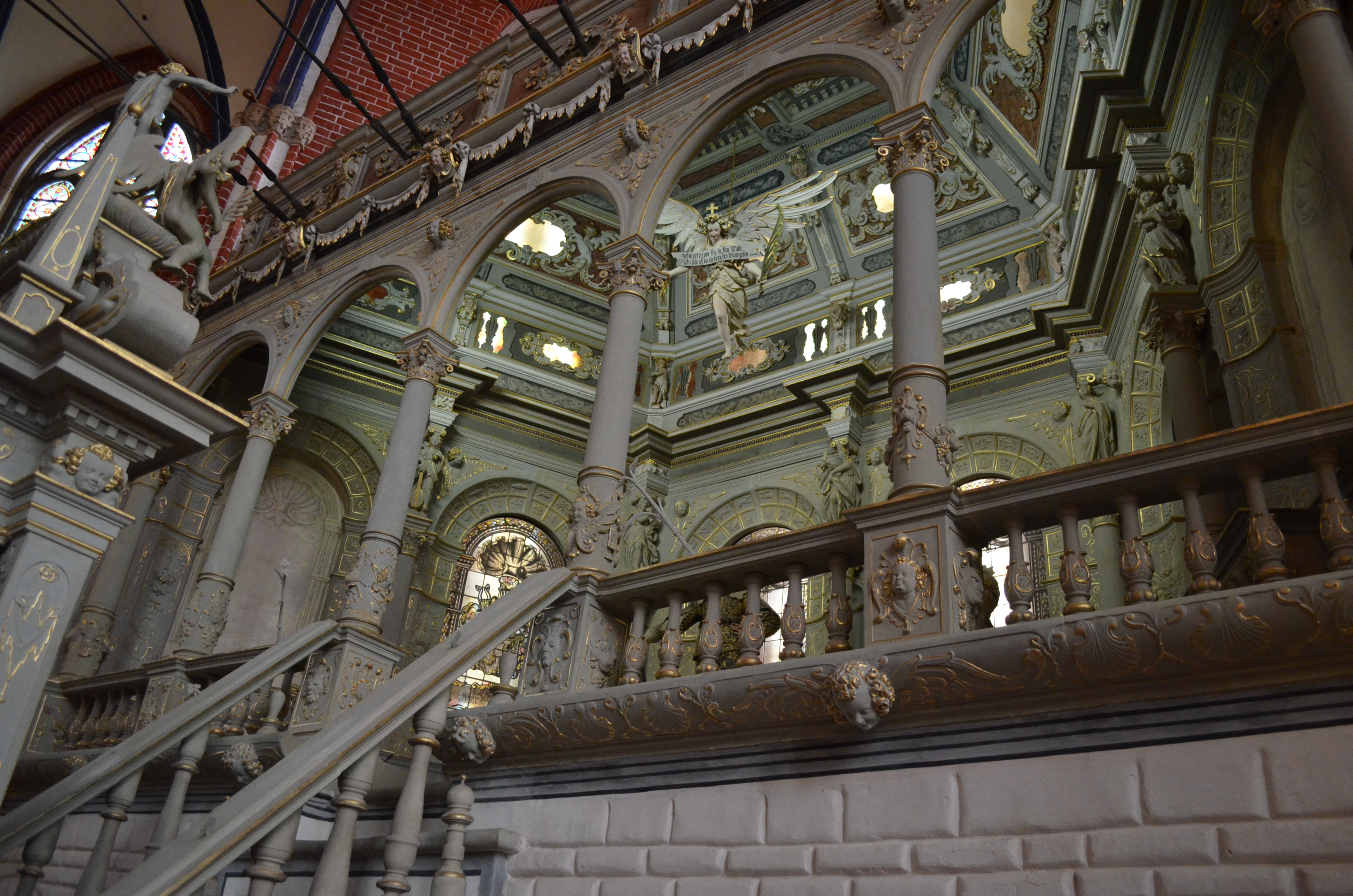 Bad Doberan, Münster, Mausoleum, Fridrich der 1.